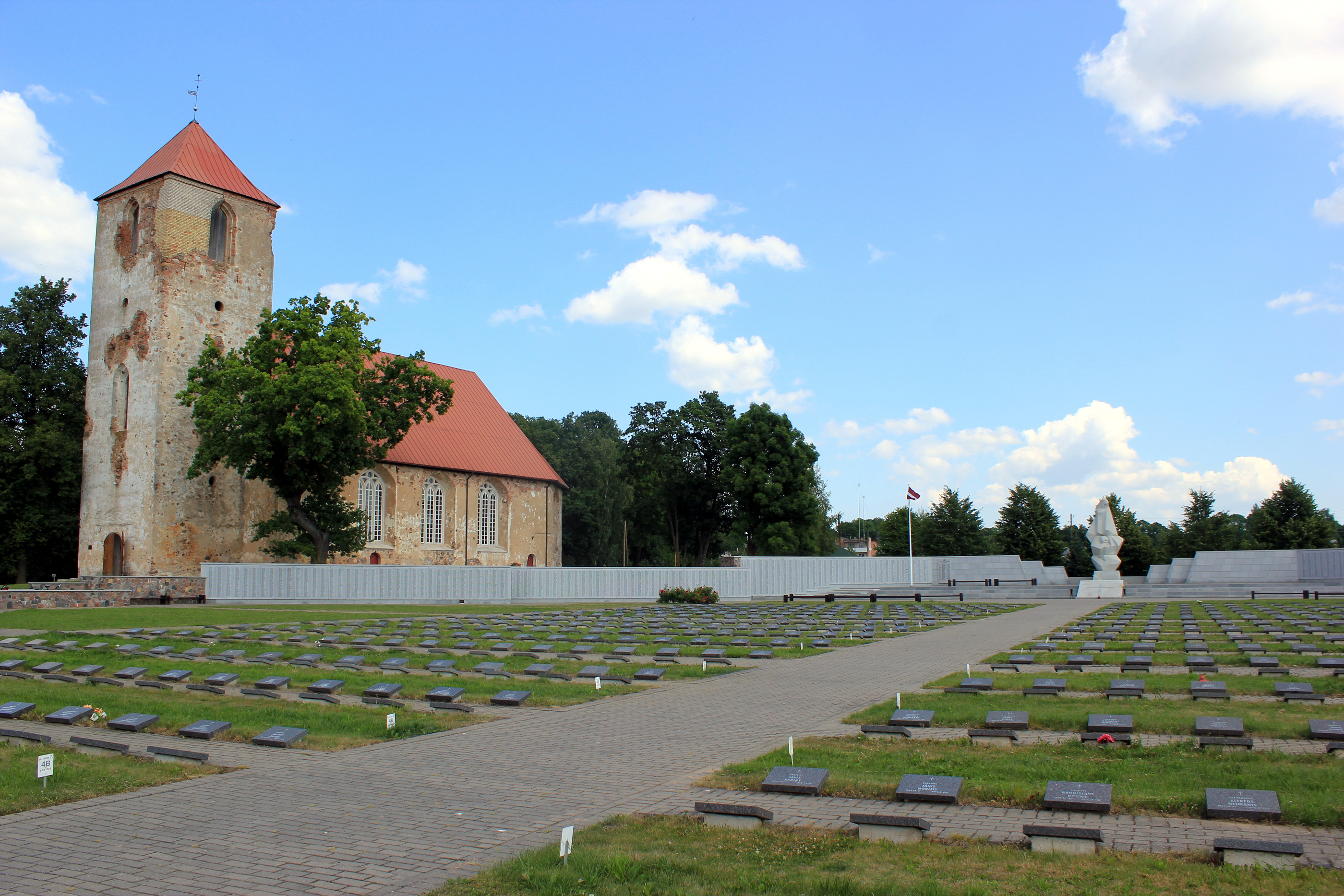 Lutherische Kirche und Soldatenfriedhof in Lestene, Lettland.